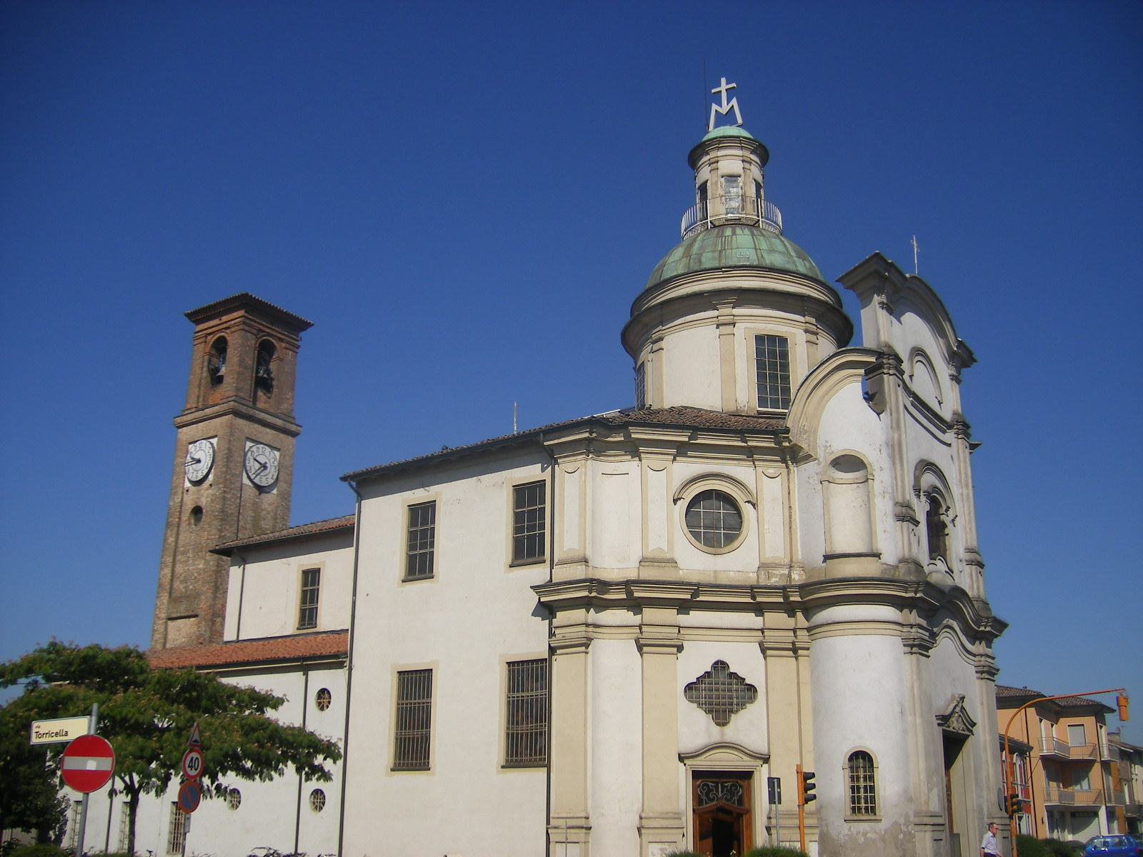 Santuario Beata Vergine del Carmelo Roveleto di Cadeo (PC) (Prima della ristrutturazione del 2009)